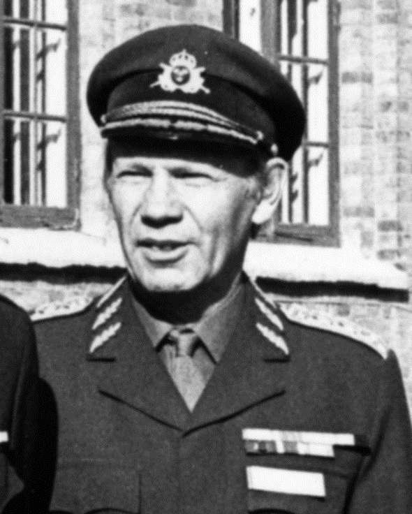 Generallöjtnant Nils Sköld vid Smålands artilleriregemente (A 6).